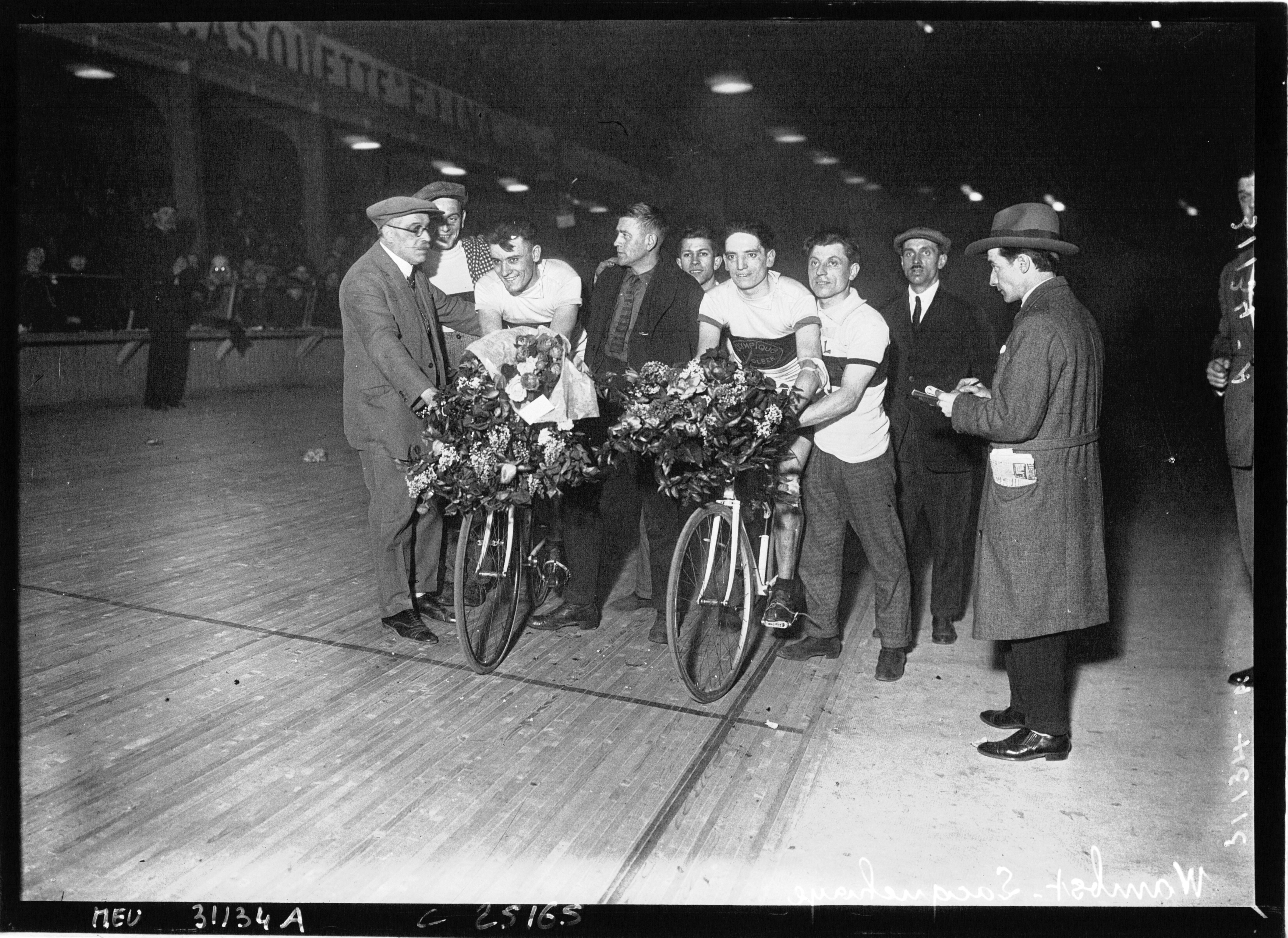 Wambst et Lacquetray après leur victoire dans les 6 jours, Vel'd'Hiv'